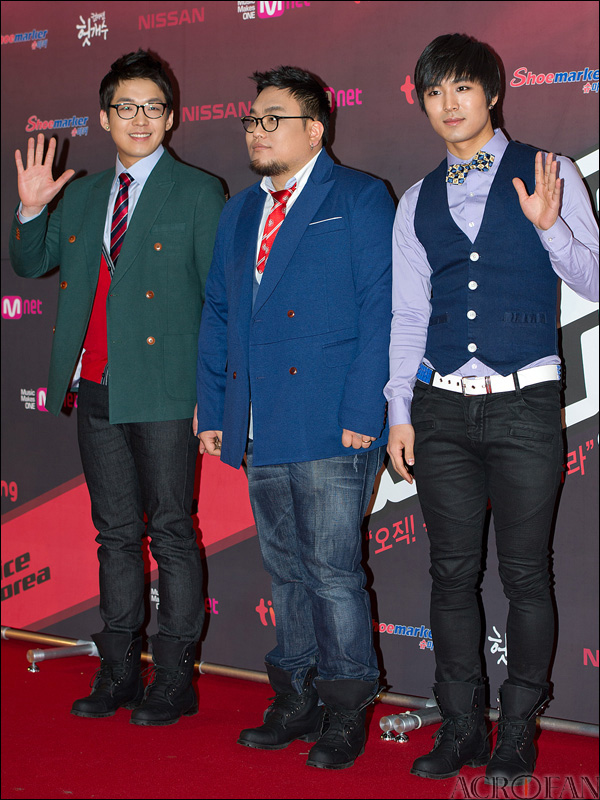 '보이스코리아' 제작발표 및 하이라이트 시사회